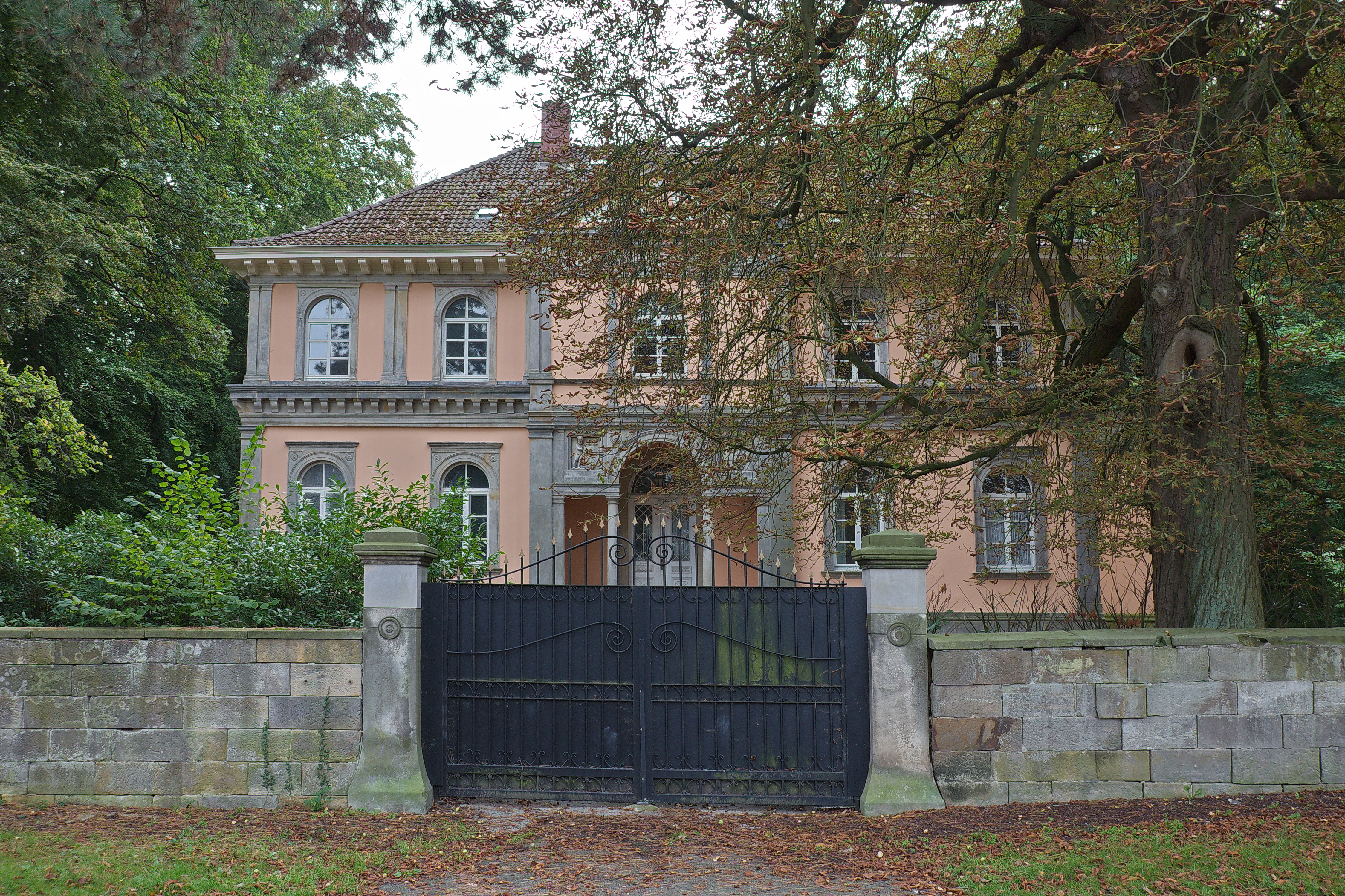 Rittergut Bennigsen in Bennigsen (Springe), Niedersachsen, Deutschland